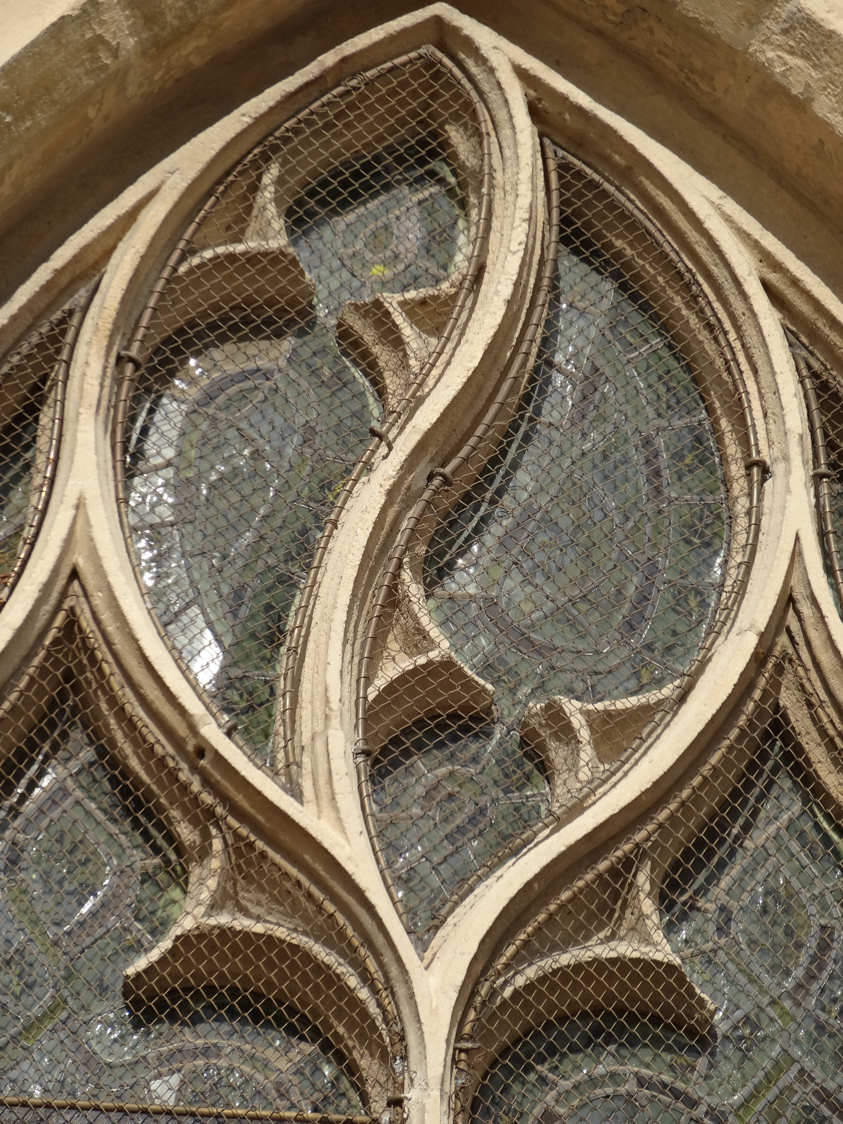 Caen, église St Georges du Château. Détail du réseau d'une fenêtre du début du XVIe siècle